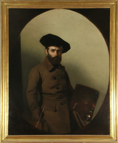 Portait du peintre italien Carlo Bellosio par Mauro Conconi.